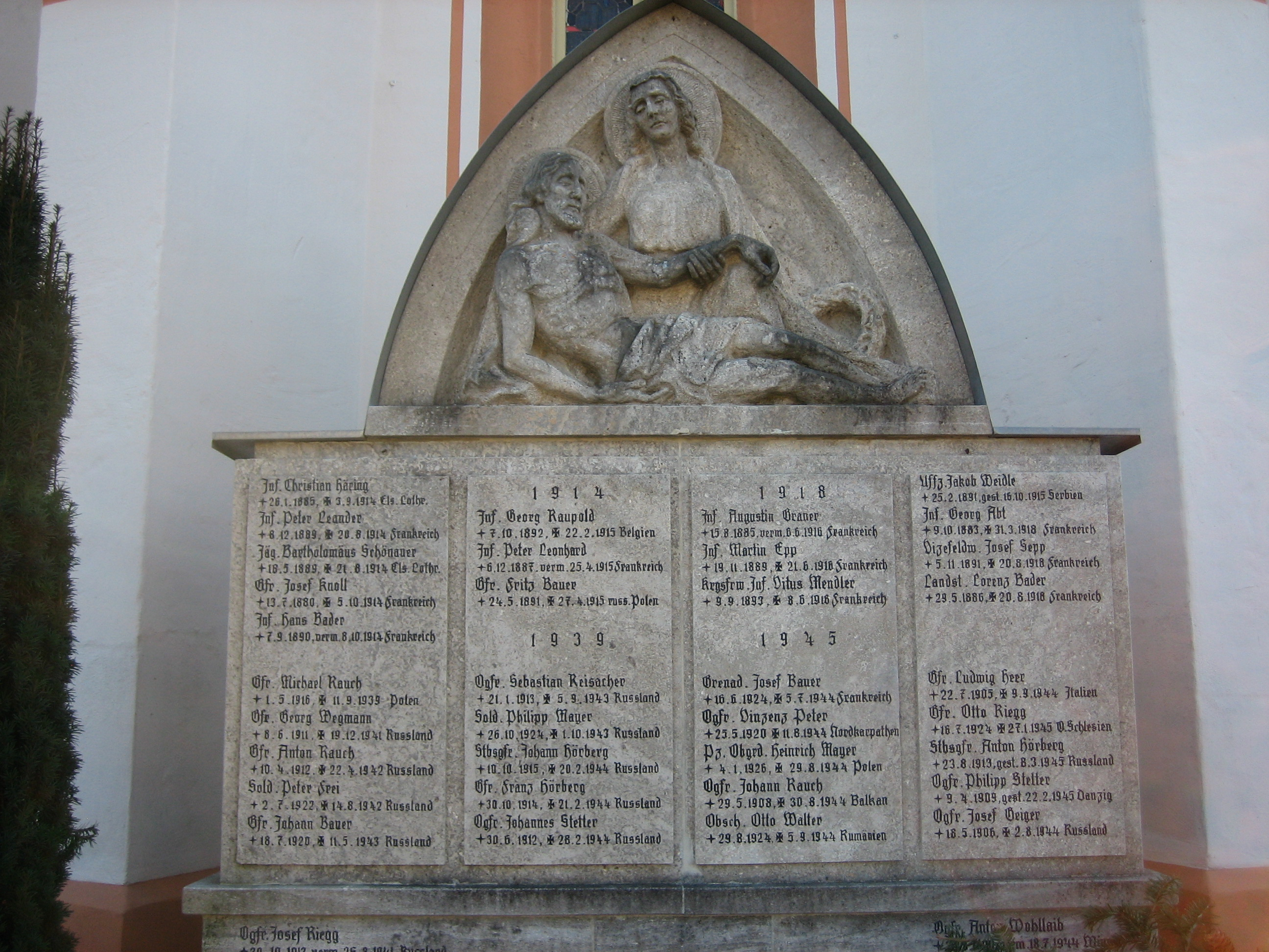 Krieger- und Soldatendenkmal bei St. Peter und Paul in Zell, Bad Grönenbach